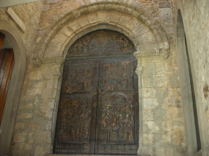 Aidone portale laterale, in pietra calcarea, della chiesa di Santa Maria La Cava; è una testimonianza dell'origine normanna di questa chiesa, fatta costruire (come risulta da un diplome del 1134) nel XII sec. da Adelasia, nipote di Ruggero II il Nornmanno, con il nome di Santa Maria Lo Plano. Insieme alla torre, cosìddetta Adelasia, e all'abside sono le uniche parti che si sono conservate dell'edificio medievale.